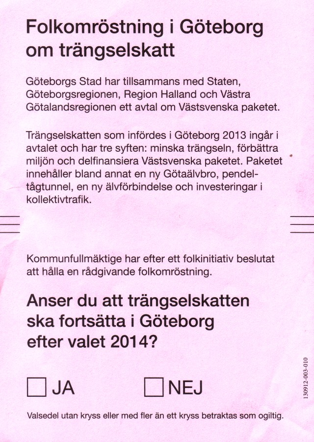 Kopia på röstsedeln gällande trängselskatt i Göteborg inför valet 2014-09-14